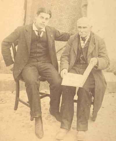 Les poètes António Xavier Rodrigues Cordeiro et Afonso Lopes Vieira.